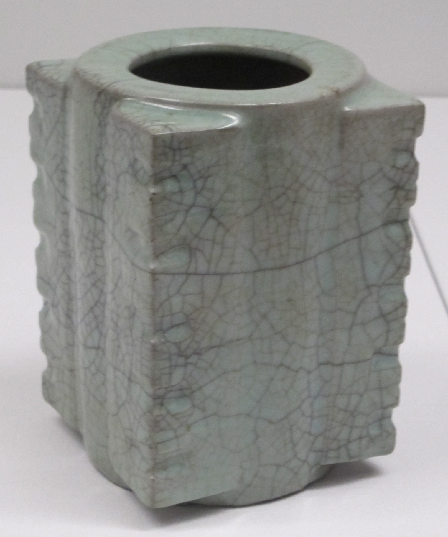 Dinastia song del sud, contenitore per l'acqua a forma di blocco di giada, XII-XIII sec.